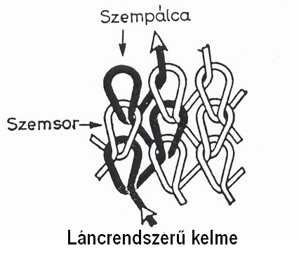 Láncrendszerű kötött kelme